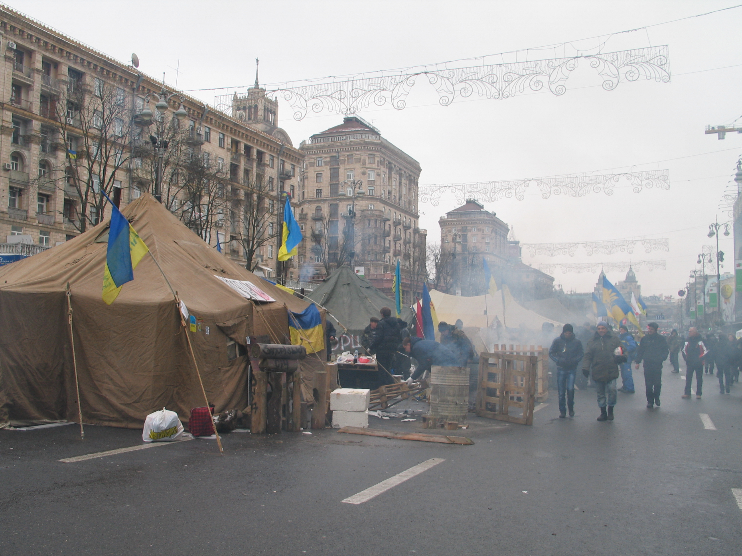 Евромайдан. Палатки на Крещатике